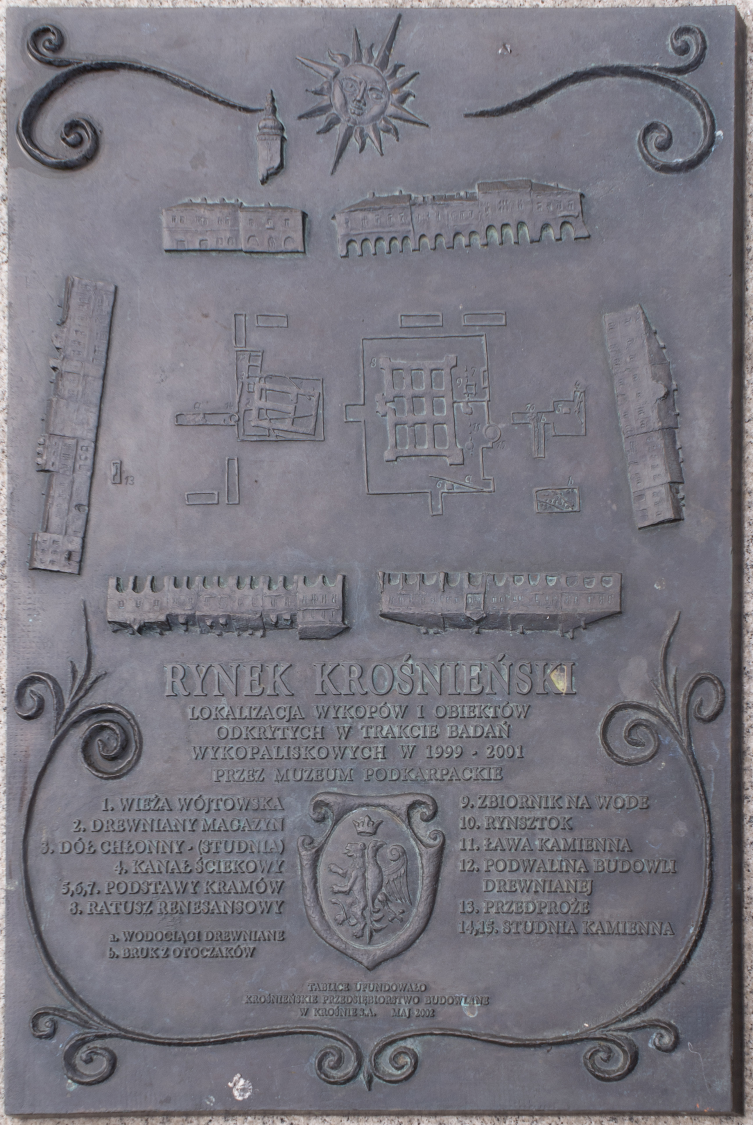 Tablica informacyjna na rynku w Krośnie zawierająca informacje o lokalizacji wykopalisk i obiektów odkrytych w trakcie badań wykopaliskowych w latach 1999-2001 przez Muzeum Podkarpackie